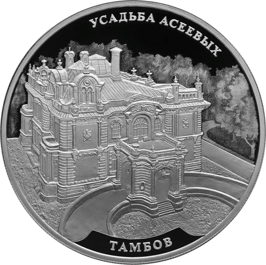 Монета Банка России. Серия: Памятники архитектуры России. Усадьба Асеевых, г. Тамбов. 3 рубля, серебро, реверс, пруф. Рельефное изображение здания усадьбы Асеевых на фоне приусадебного парка; вдоль канта — надписи: вверху — «УСАДЬБА АСЕЕВЫХ», внизу – «ТАМБОВ». Чеканка — Санкт-Петербургский монетный двор. Художник: О.Г. Шепель. Скульптор: О.Г. Шепель.